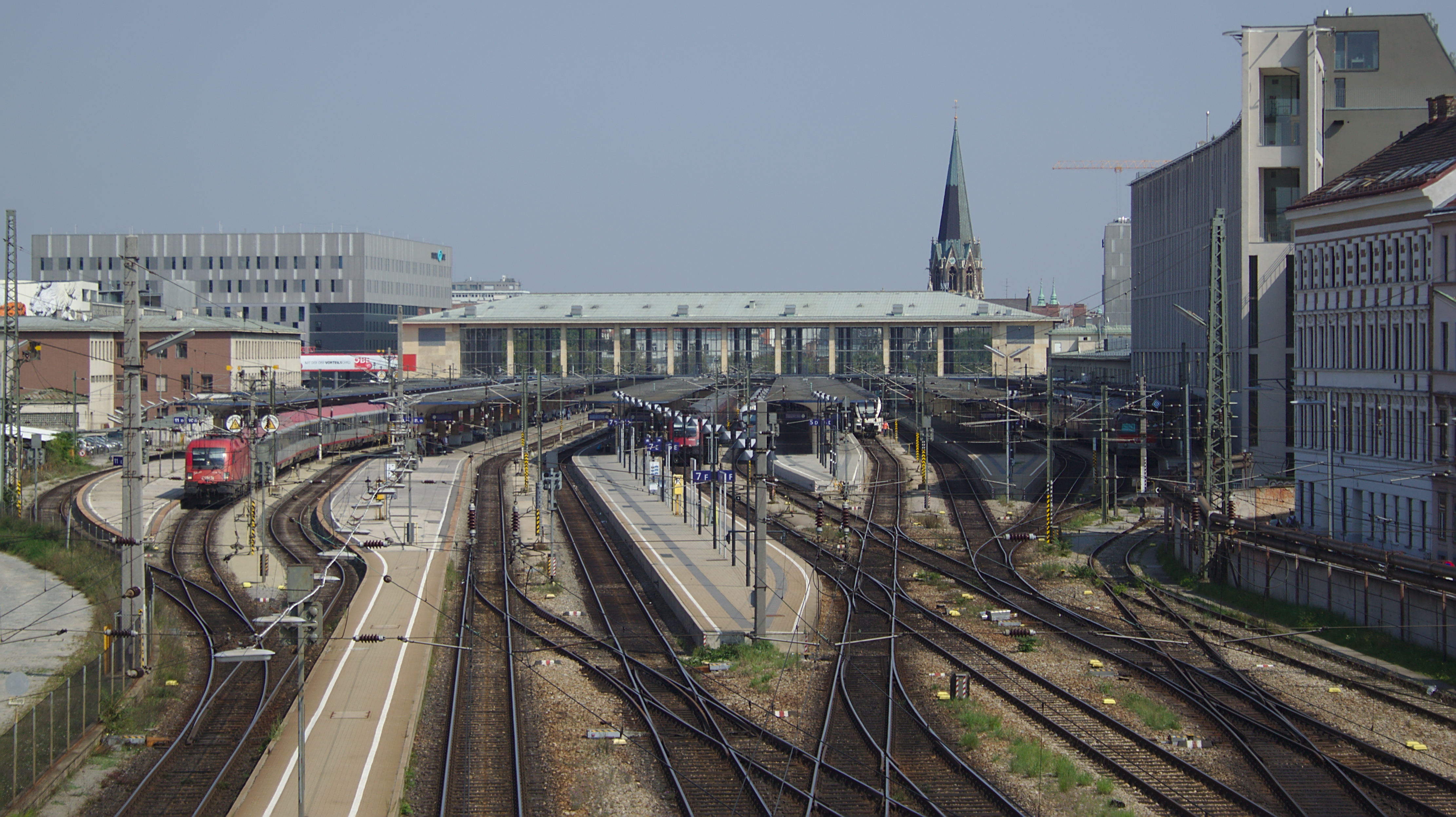 Westbahnhof